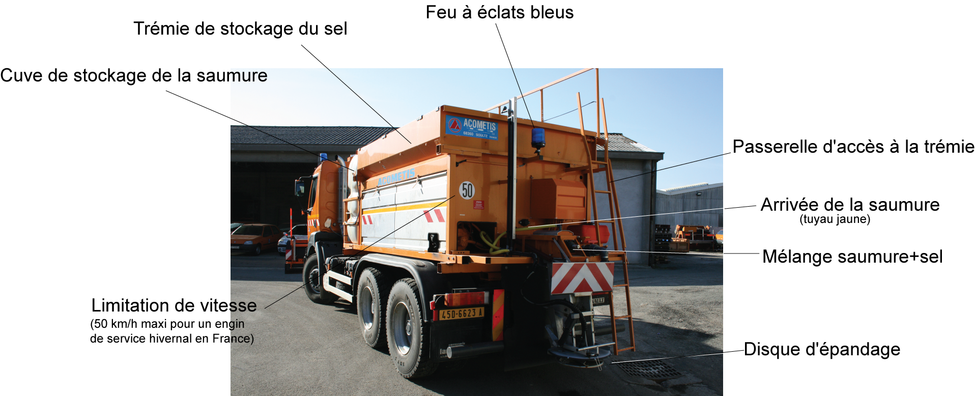 Eléments constituant une épandeuse (outil de répandage du sel pour le déneigement des routes)